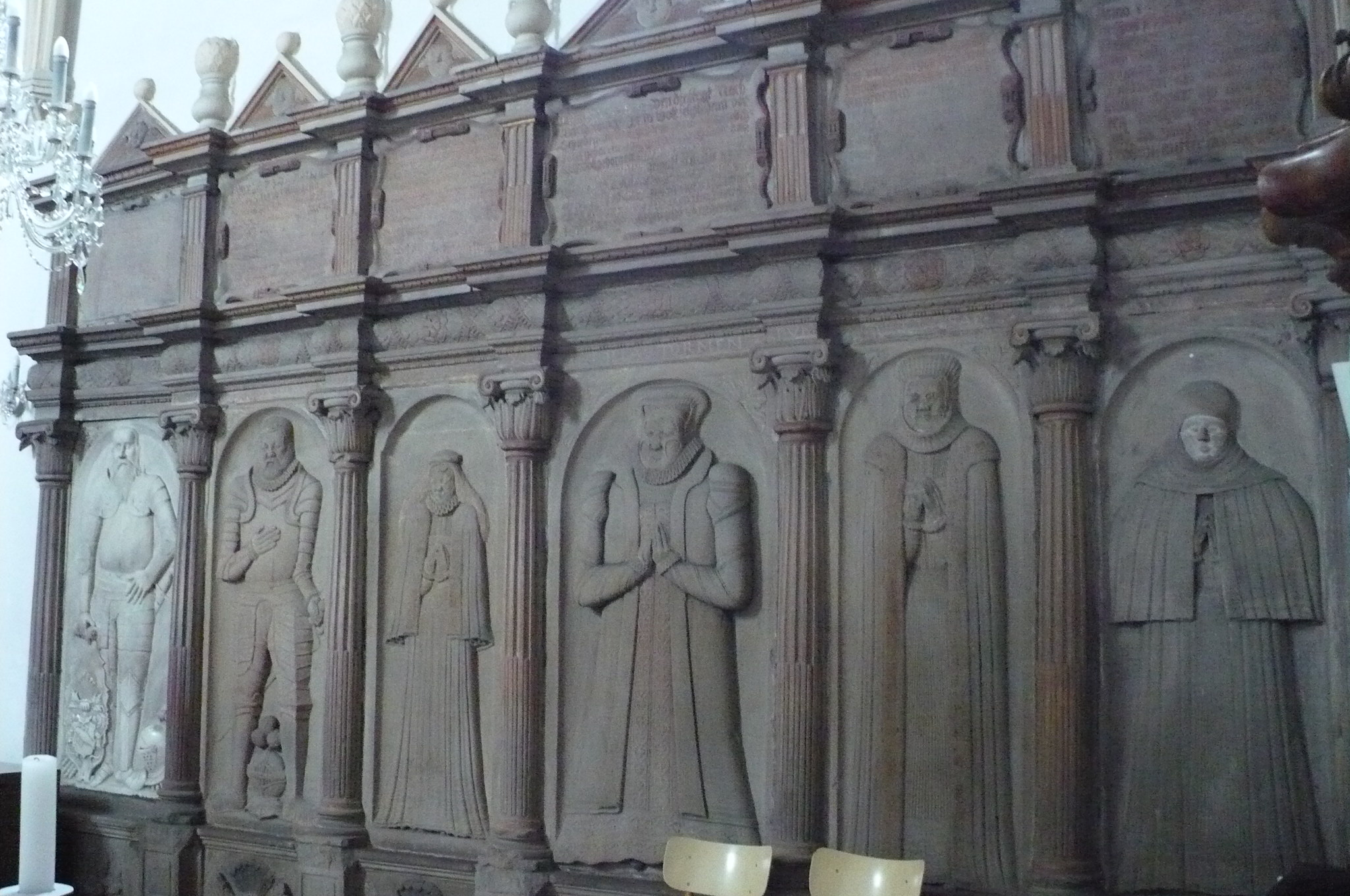 náhrobní kameny